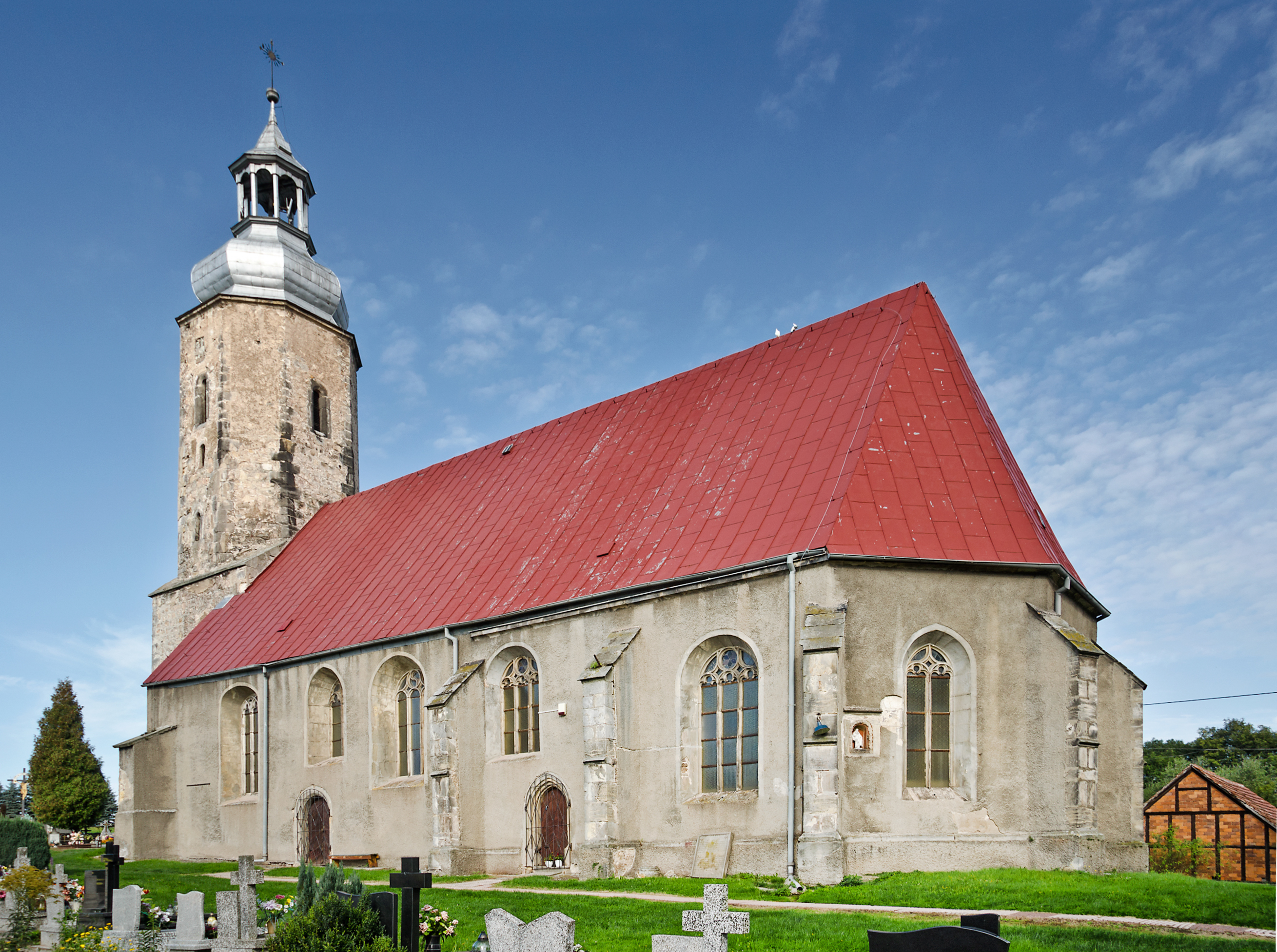 kościół fil. p.w. św. Bartłomieja, XIII, 1558 Płóczki Górne, Lwówek Śląski